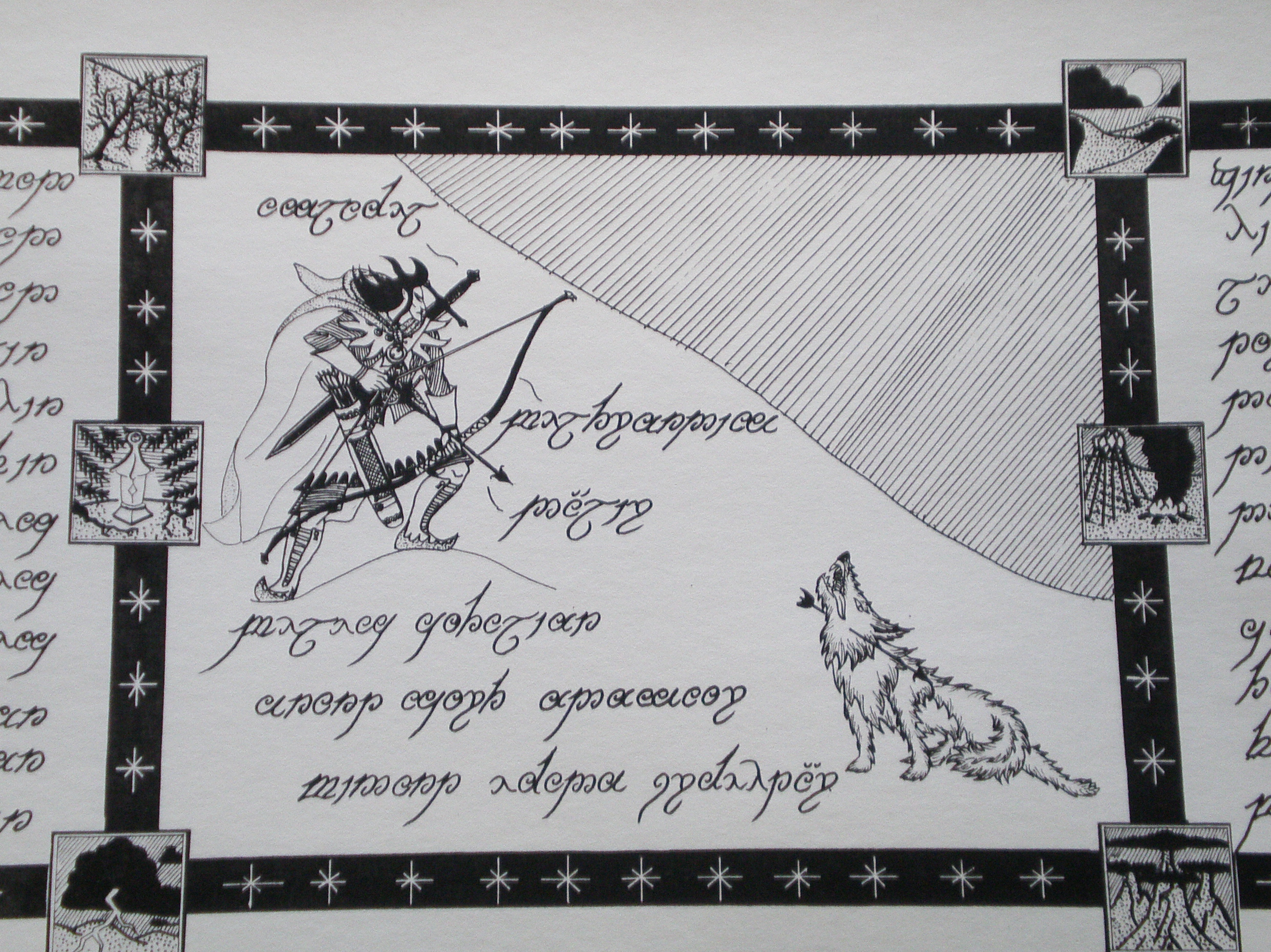 BELEG